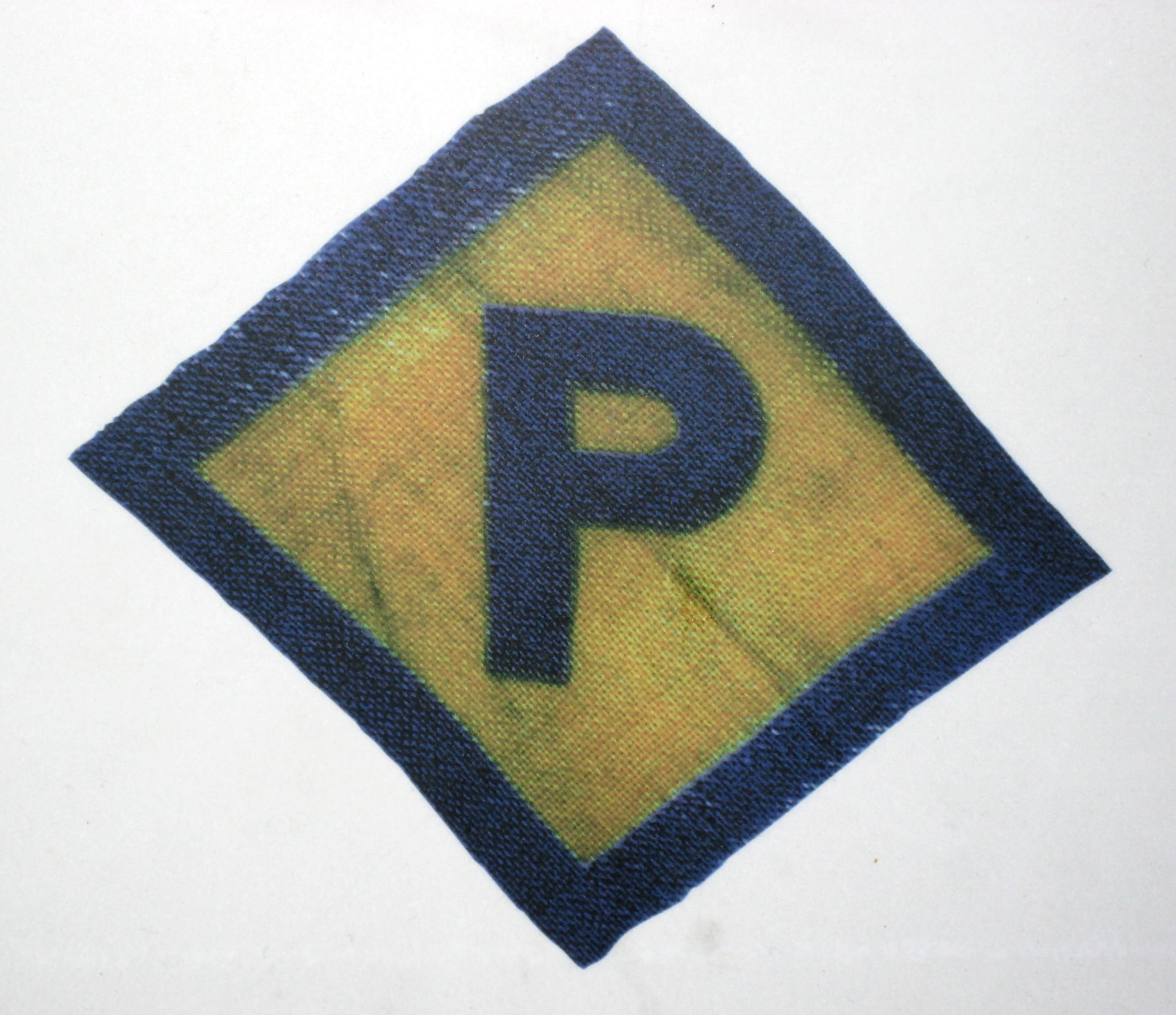 Ein sogenanntes "Polenabzeichen", das aufgrund der "Polen-Erlasse" vom 8. März 1940 jeder polnische Zwangsarbeiter in Deutschland tragen musste.